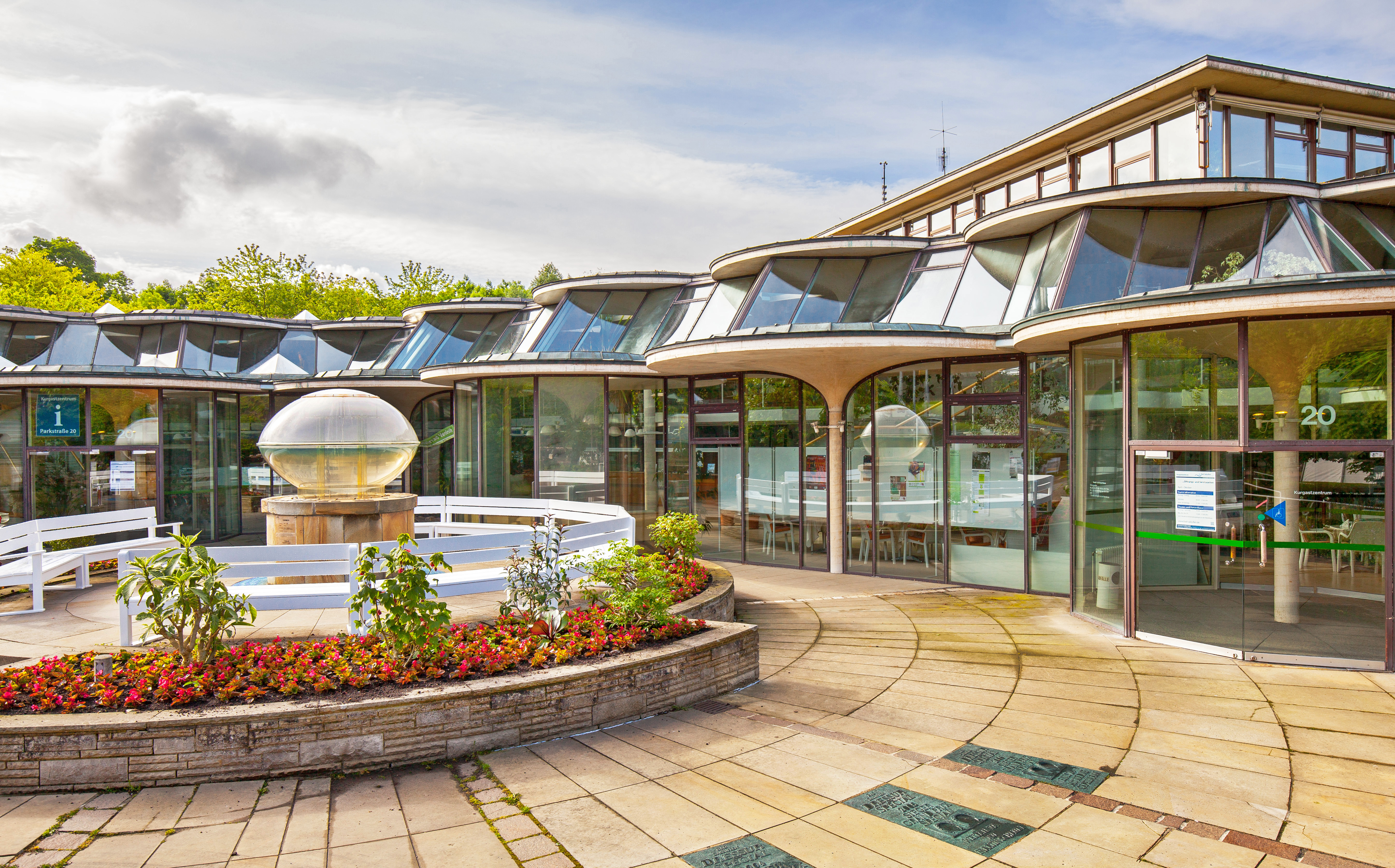 Kurgastzentrum in Bad Salzuflen, Kreis Lippe, Nordrhein-Westfalen. This is a photograph of an architectural monument. It is on the list of cultural monuments of Bad Salzuflen